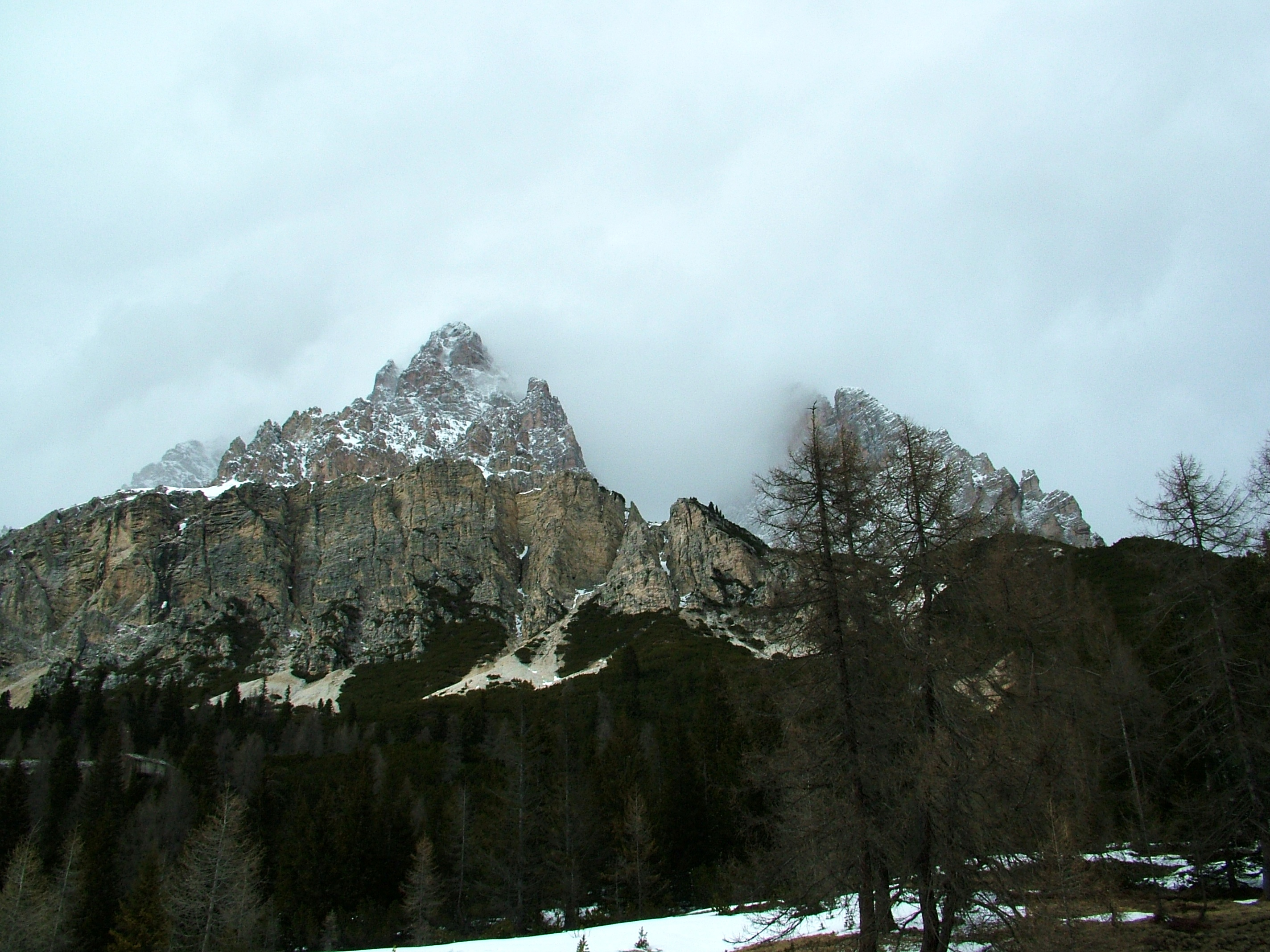 Passo Tre Croci, Dolomitok (Olaszország)